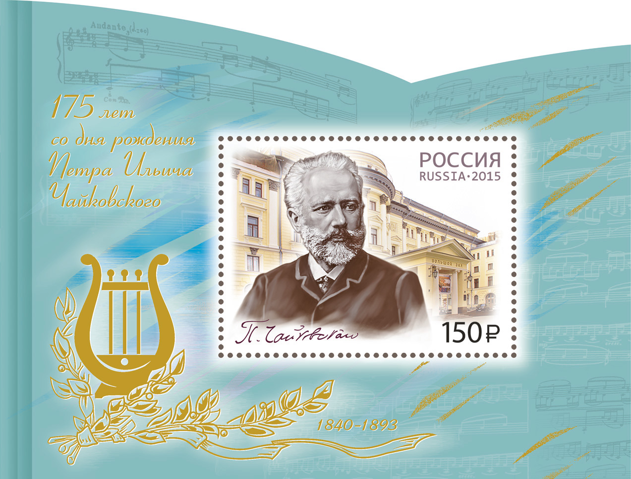 Почтовый блок и конверт первого дня гашения выпущены в обращение Почтой России 28 мая 2015 года к 175 летию П.И. Чайковского. На марке изображён портрет и факсимиле композитора и здание Московской консерватории его имени. Художник-дизайнер - А. Федулов. Тираж – 70 000 экз.